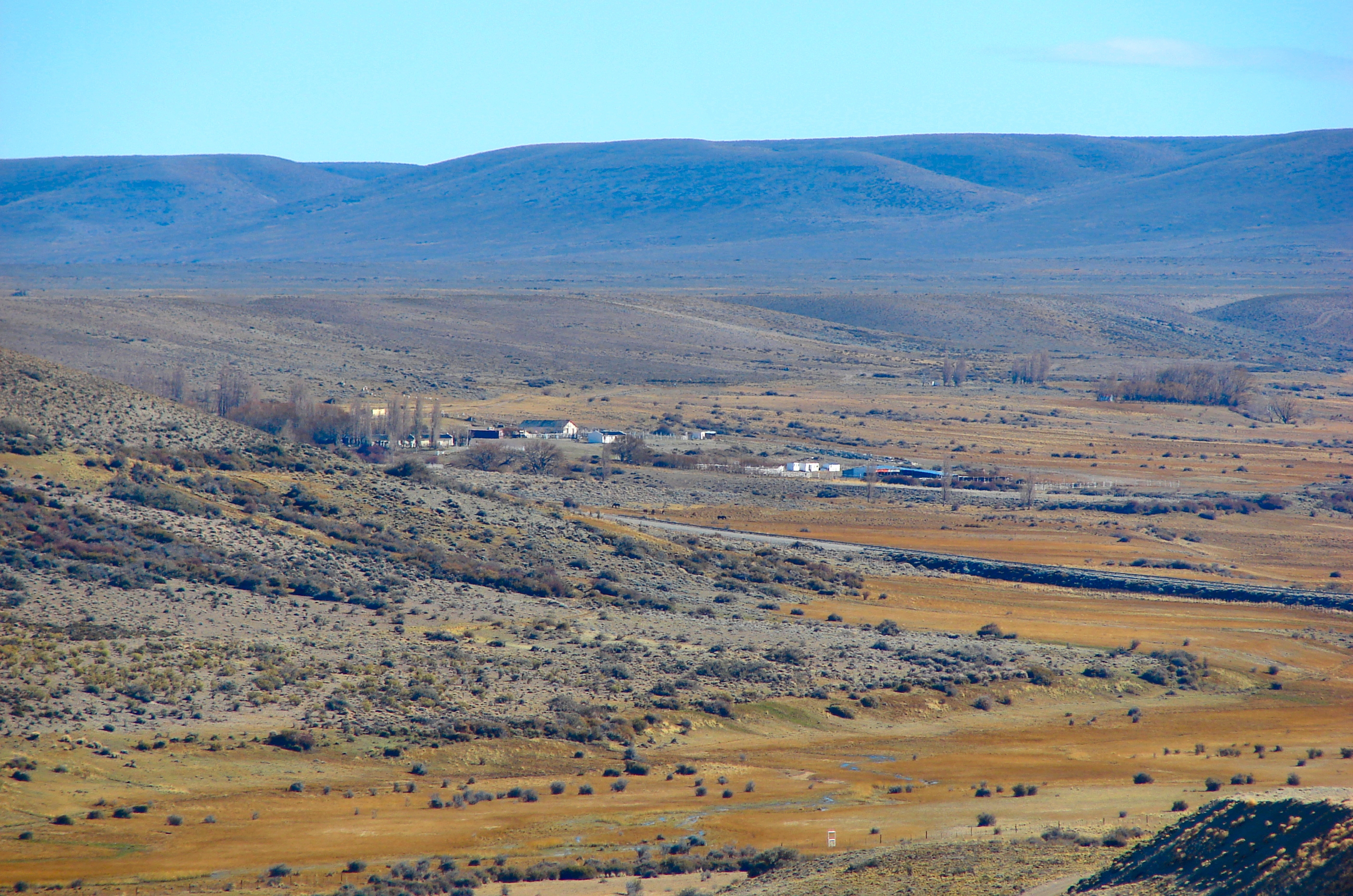 Lago Buenos Aires Department, Santa Cruz Province, Argentina